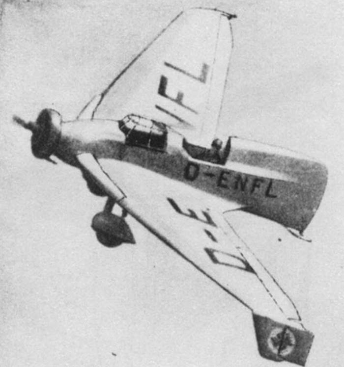 Le Lippisch DFS 39 en vol